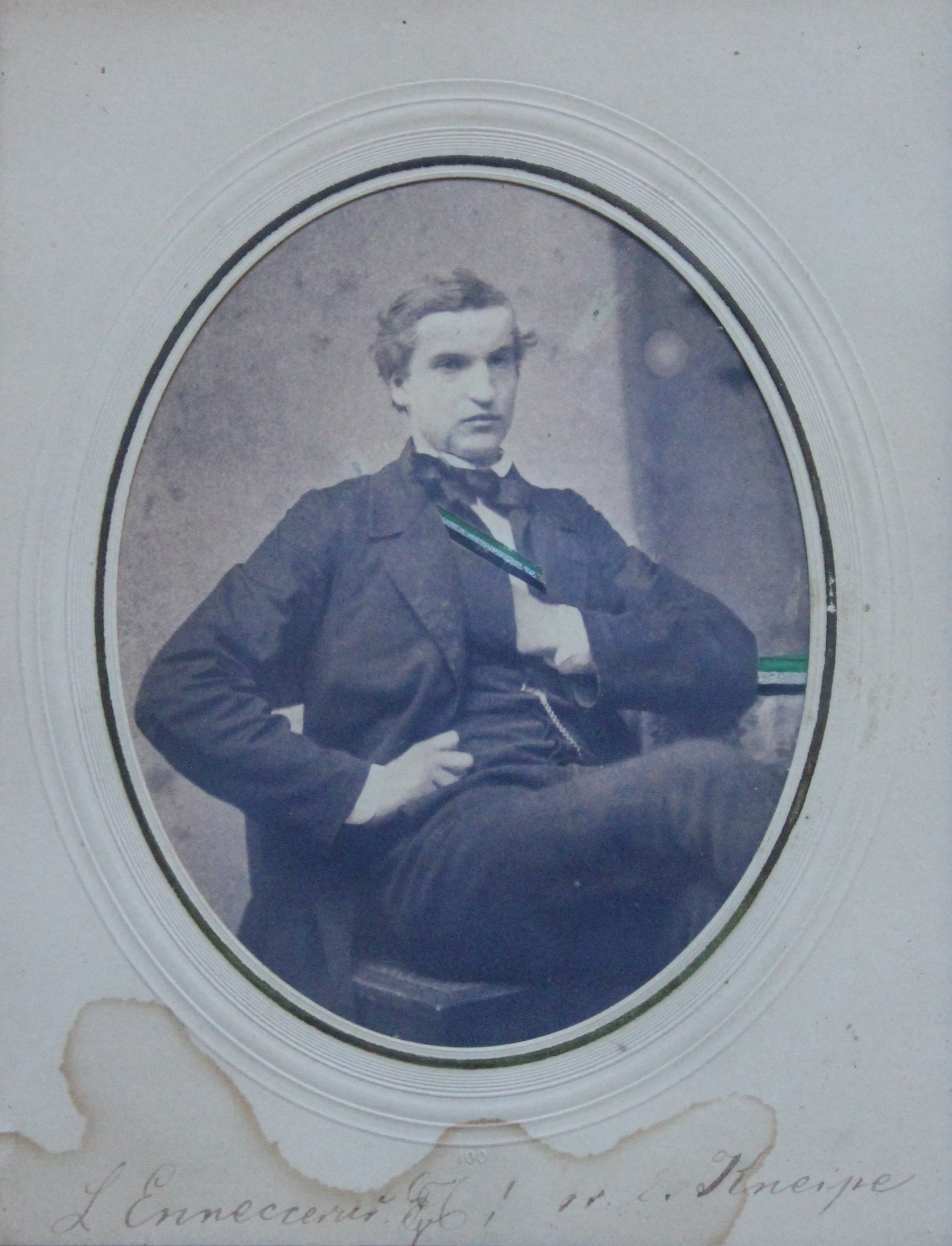 Porträtfotografie des späteren Rechtsgelehrten Ludwig Enneccerus (1843–1928) als Student in Göttingen.